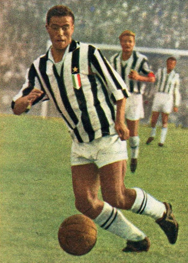 Torino, stadio Comunale, 12 ottobre 1958. L'attaccante bianconero Bruno Nicolè in azione nel corso della sfida tra Juventus e Napoli (2-0) valevole per la 4ª giornata del campionato italiano di Serie A 1958-59; sullo sfondo si riconosce il capitano dei bianconeri, Giampiero Boniperti.